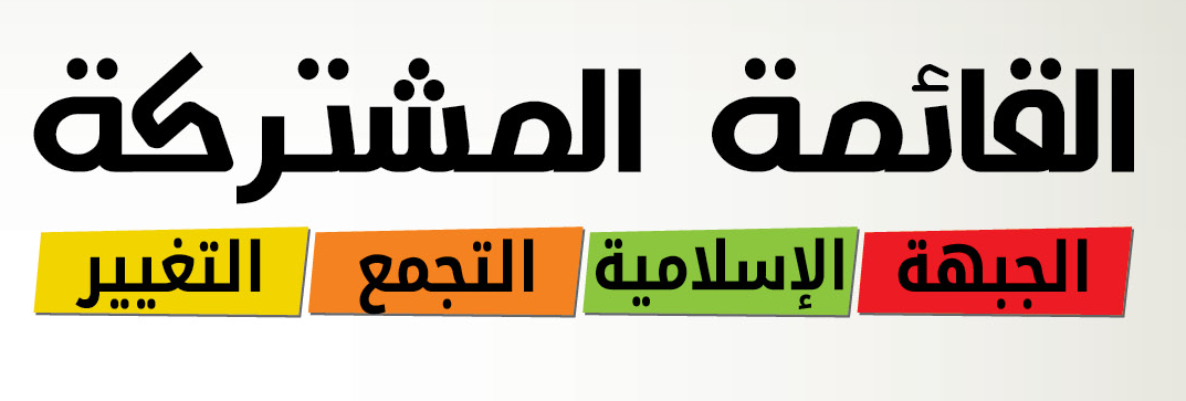 شعار القائمة المشتركة